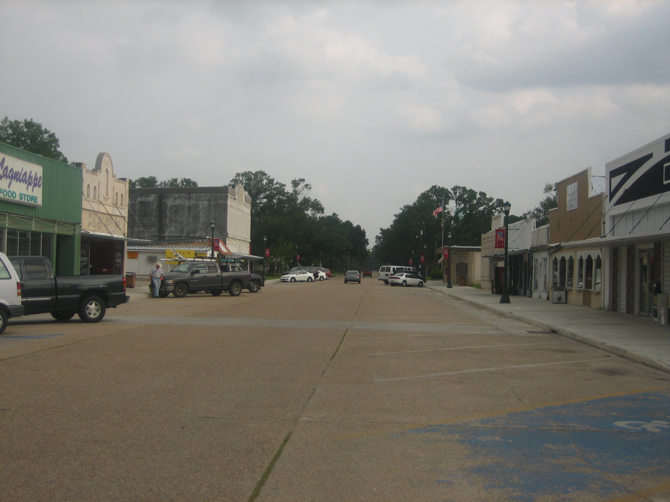 Vinton, Louisiana.